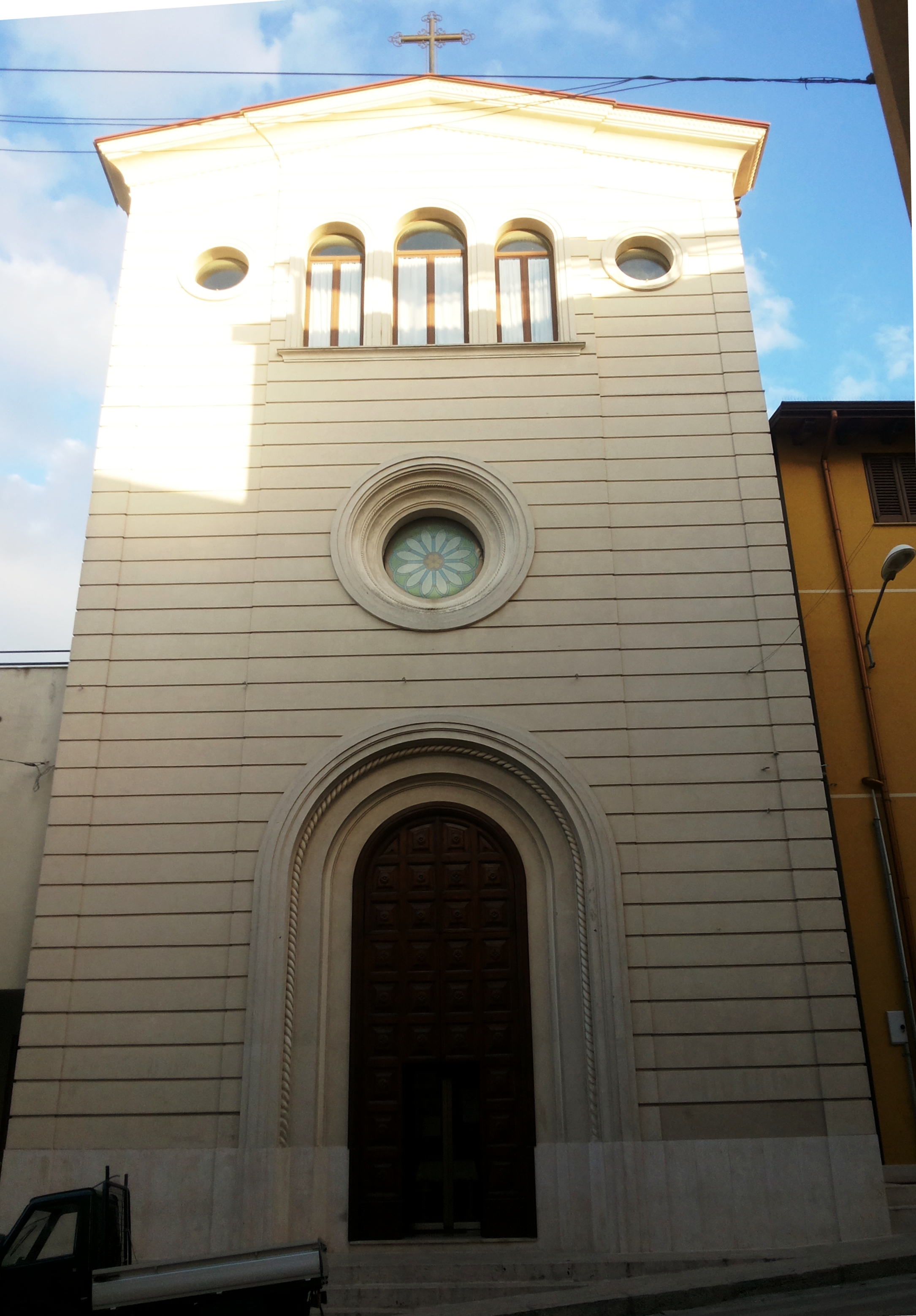 Facciata della chiesa